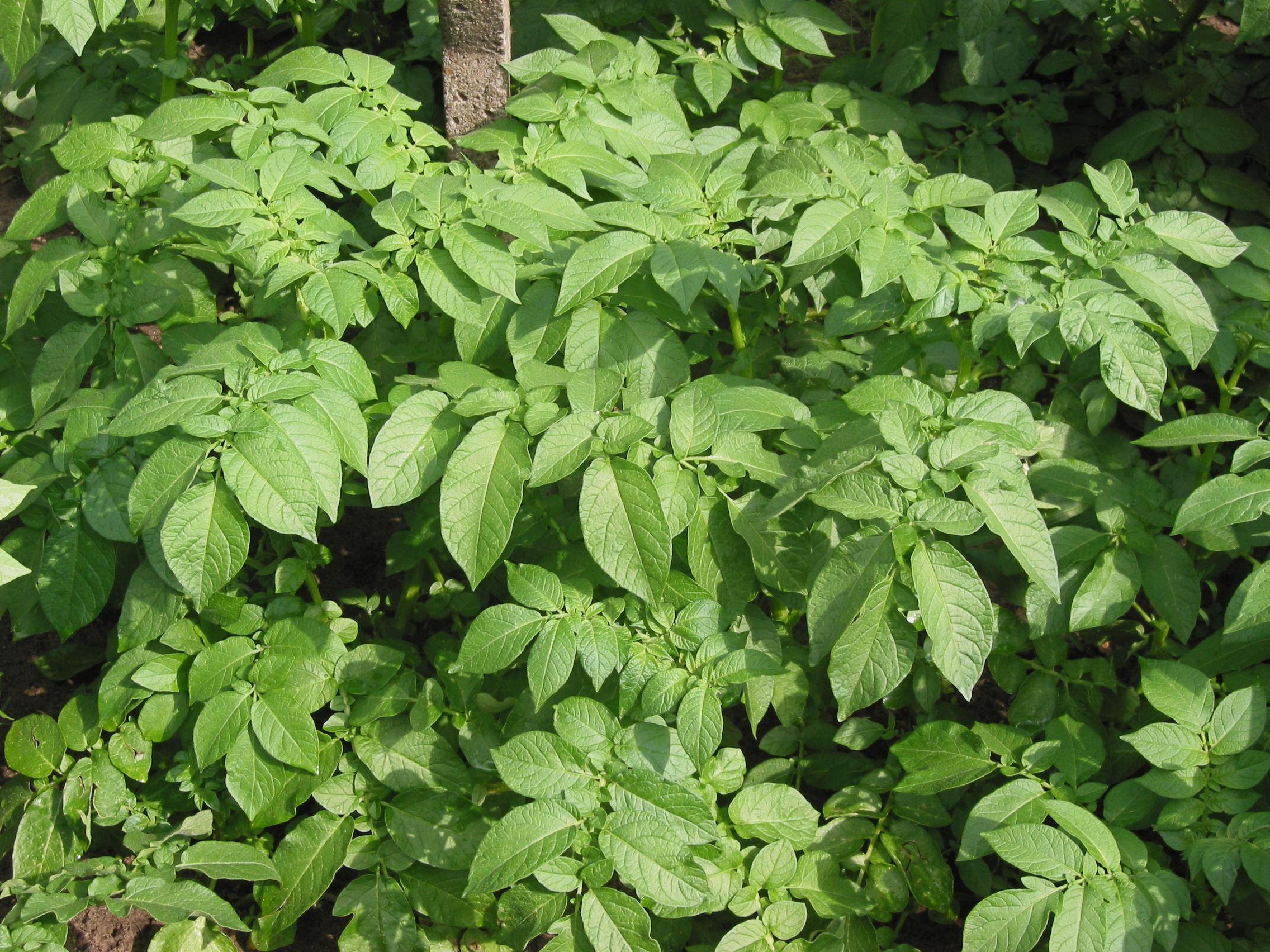 Solanum tuberosum 'Doré'